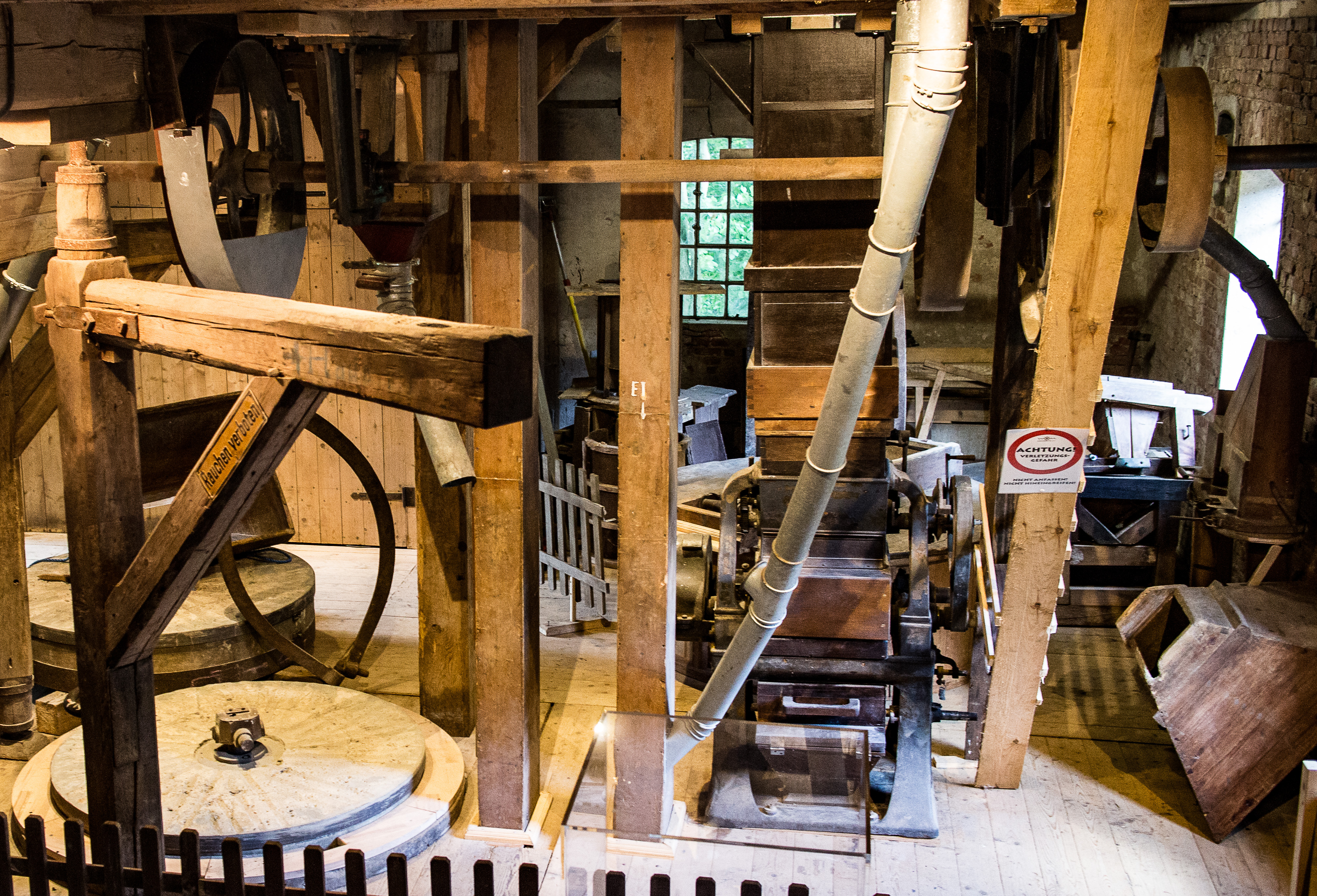 Obergschoss des Mühlenhauses